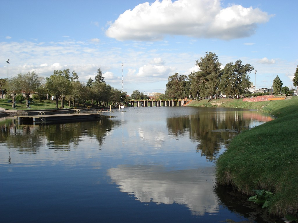 Balneario Municipal Cipriano Catriel ubicado sobre el arroyo Tapalqué. Este cruza la ciudad de Olavarría de sur a norte en la Provincia de Buenos Aires, Argentina.